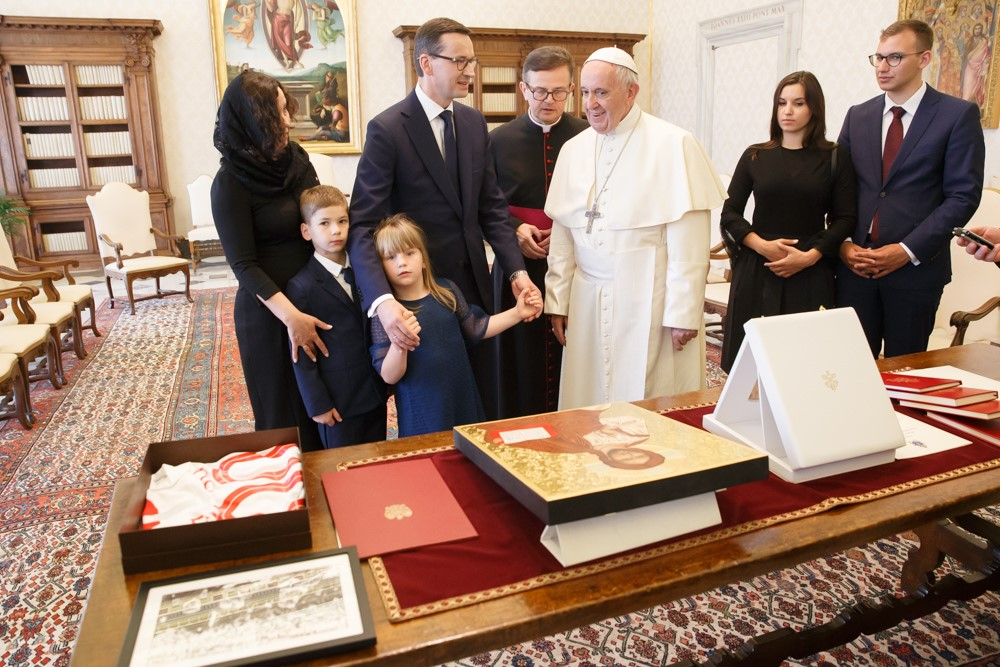 2018.06.04 Watykan Premier Mateusz Morawiecki złożył wizytę w Watykanie. Fot. Krystian Maj / KPRM